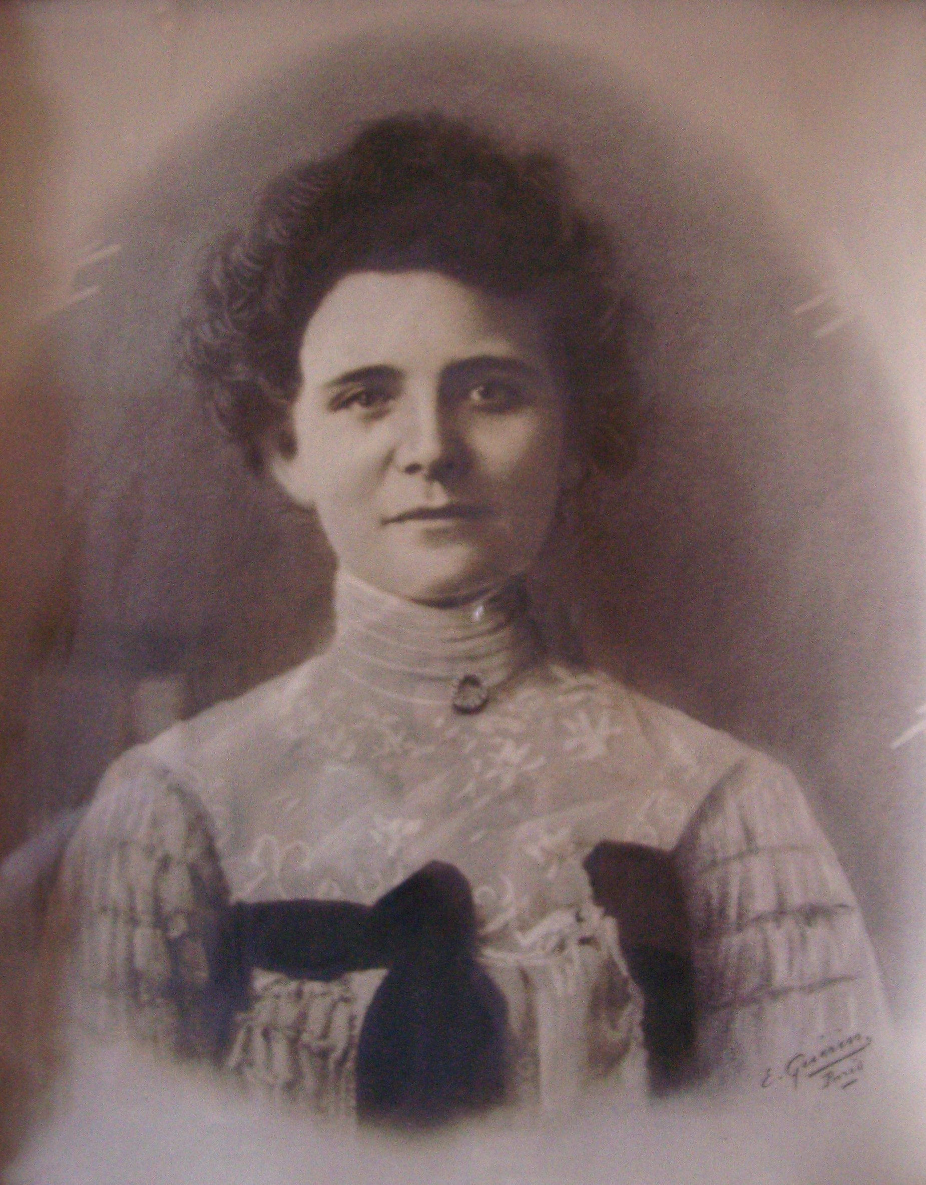 Portrait de Mathilde Laigle (1865-1949) par Guérin (archives privées des descendants)